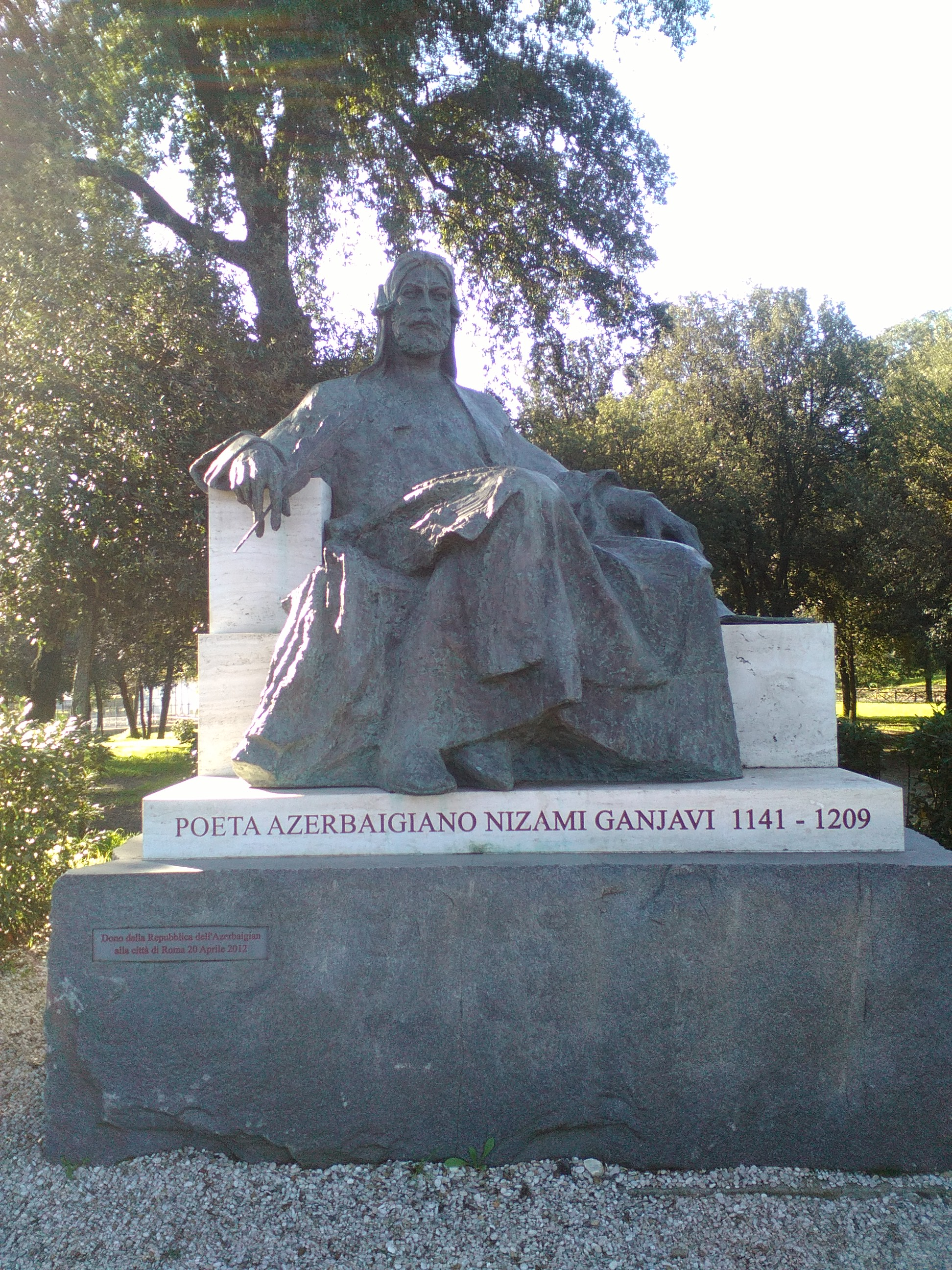 Statua in memoria del poeta azerbaigiano Nizami Ganjavi a Valle Giulia (Roma)